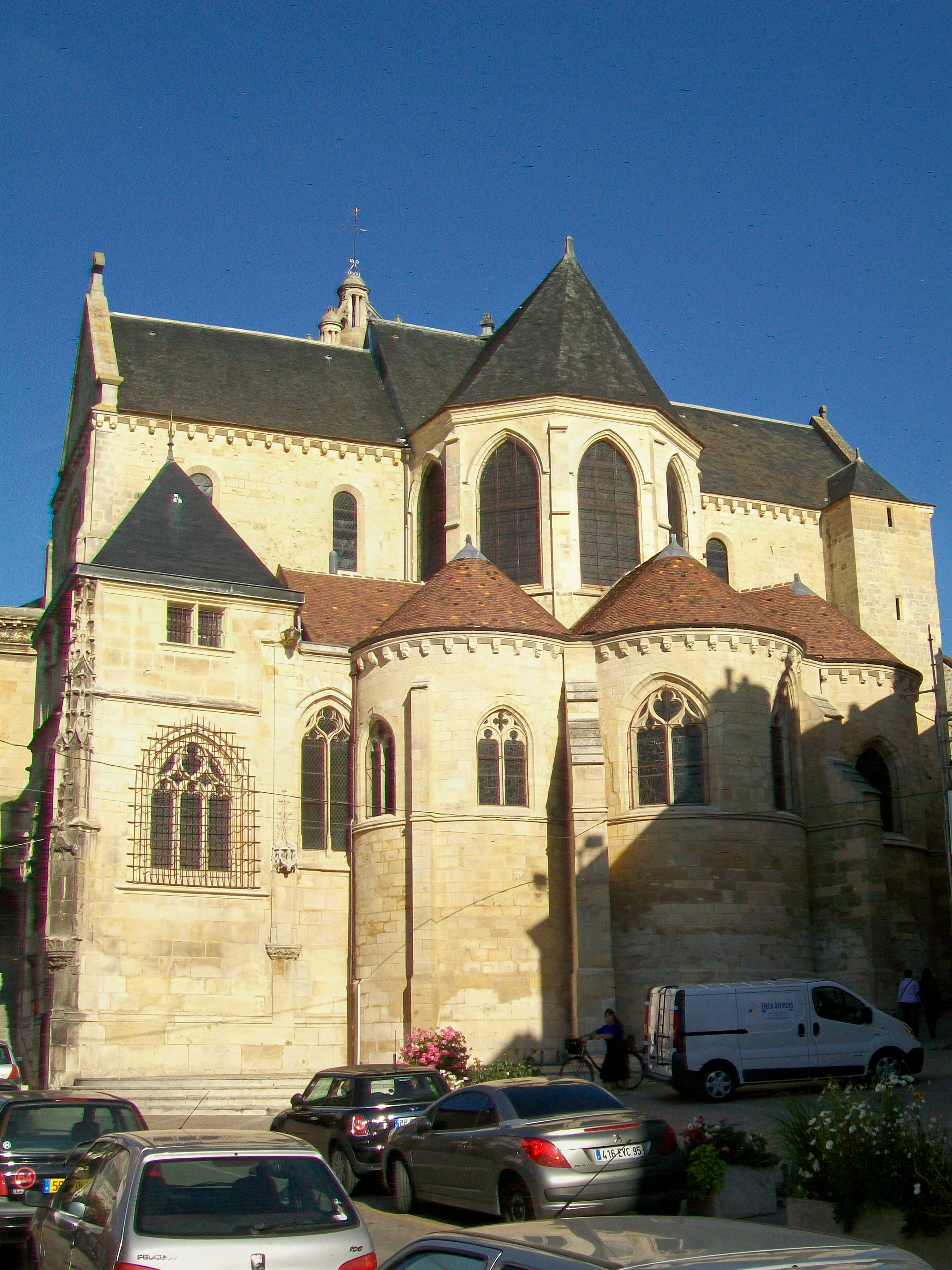 La façade orientale de la cathédrale Saint-Maclou, depuis la rue de l'Hôtel de ville.